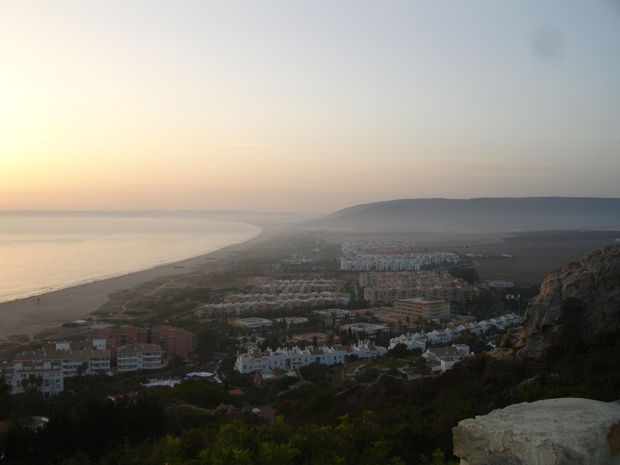 Zahara de los Atunes